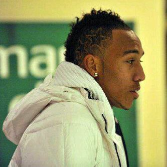 en octobre 2011